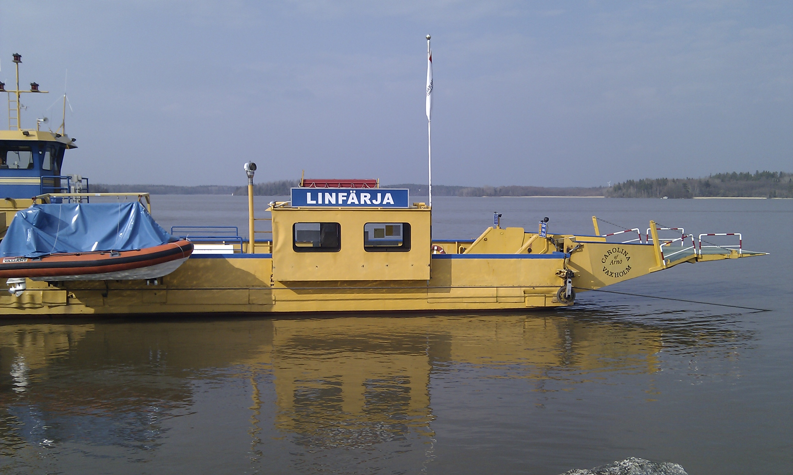 Färjan Carolina af Arnö som trafikerar Arnöleden i Mälaren